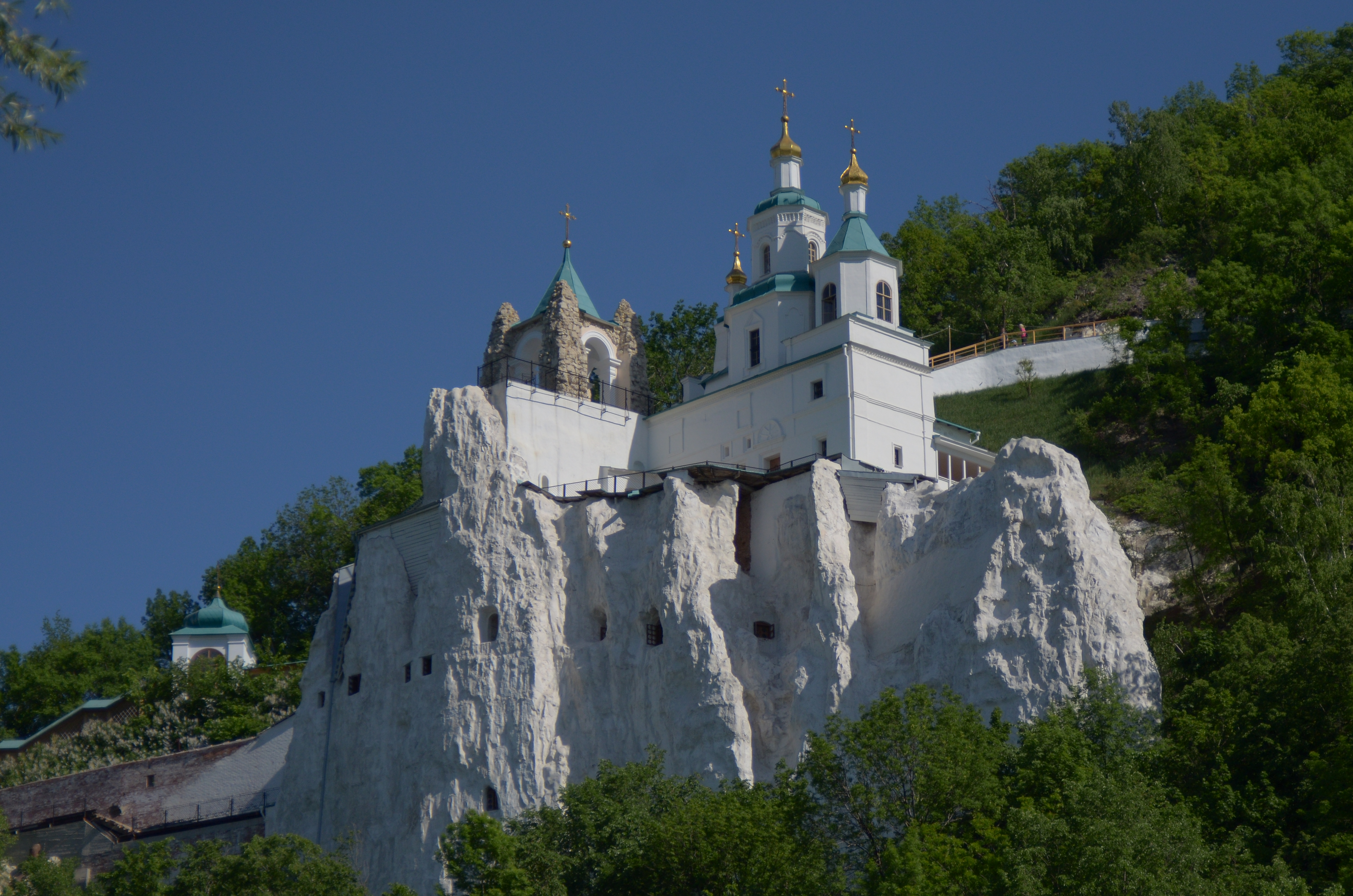 Сплав по Северскому Донцу. Начало сплава около села Студенок, окончание в Святогорске